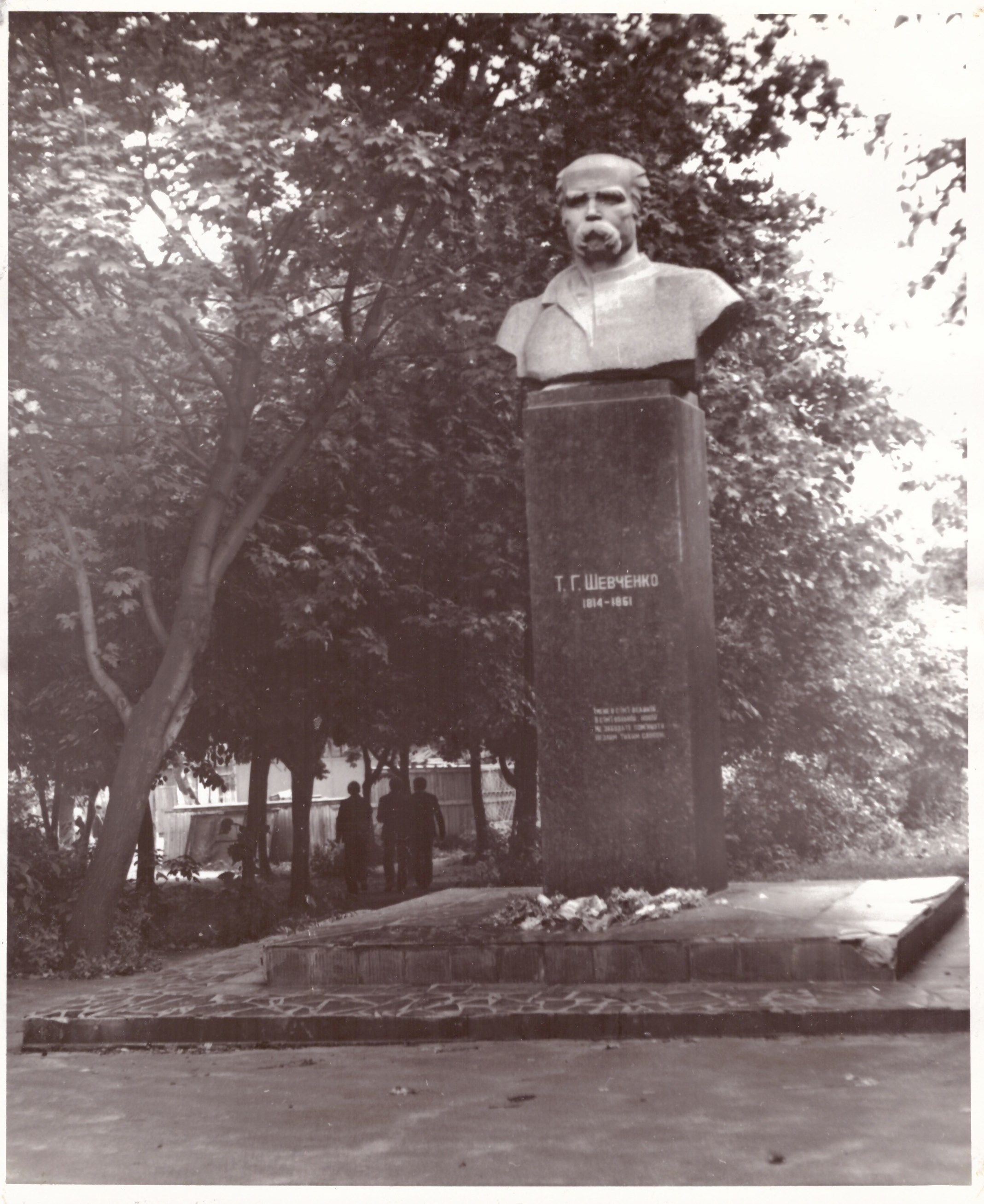 Пам’ятник Т.Г. Шевченку у м. Радомишлі Житомирської області. Штучний граніт, граніт. 1971. Скульптор Таранченко В.О.